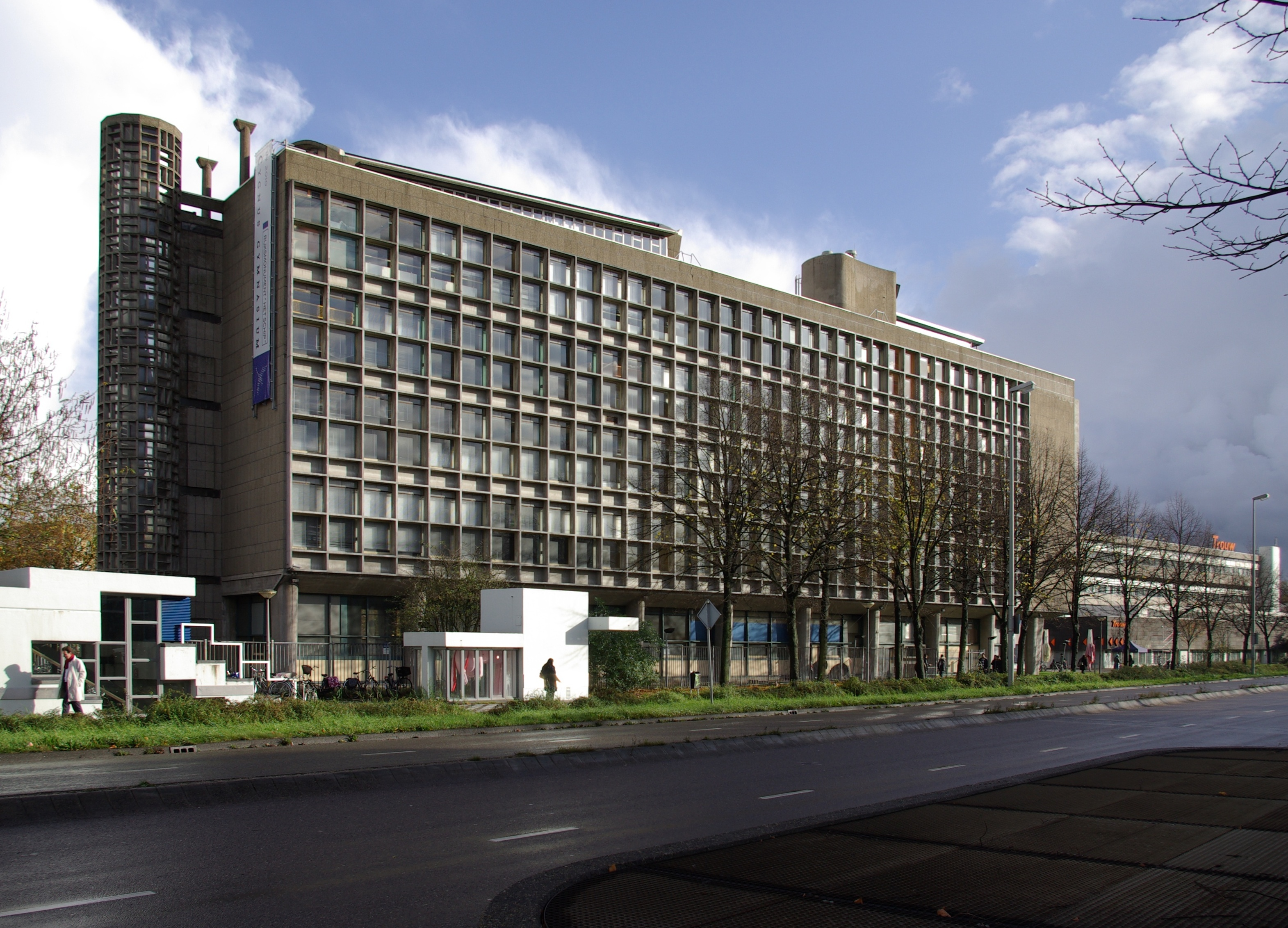 Voormalig schoolgebouw LTS/Patrimonium in de Vrolikstraat (Wibautstraat) in Amsterdam